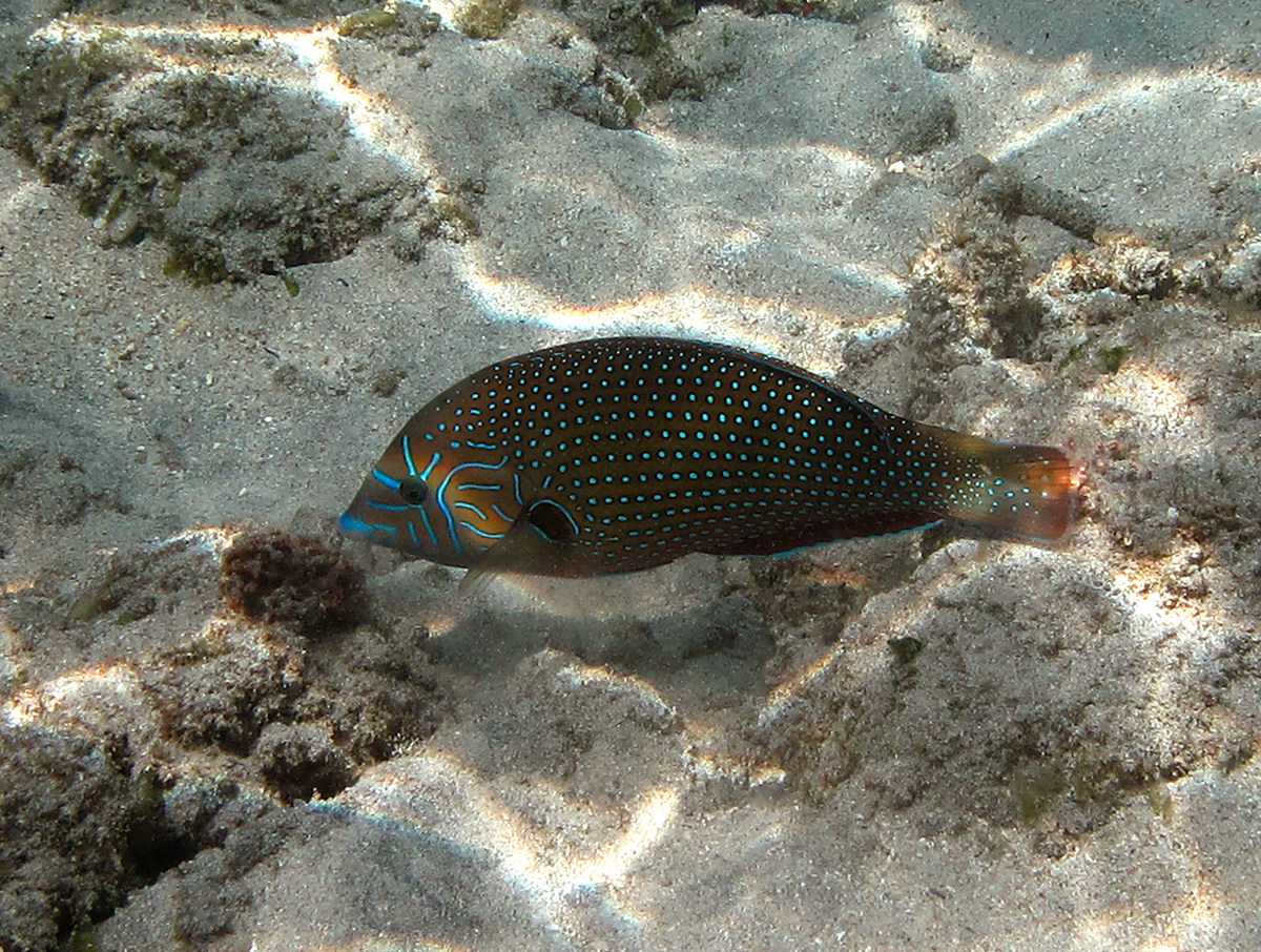 Un labre constellé (Anampses caeruleopunctatus) en phase initiale à la Réunion.